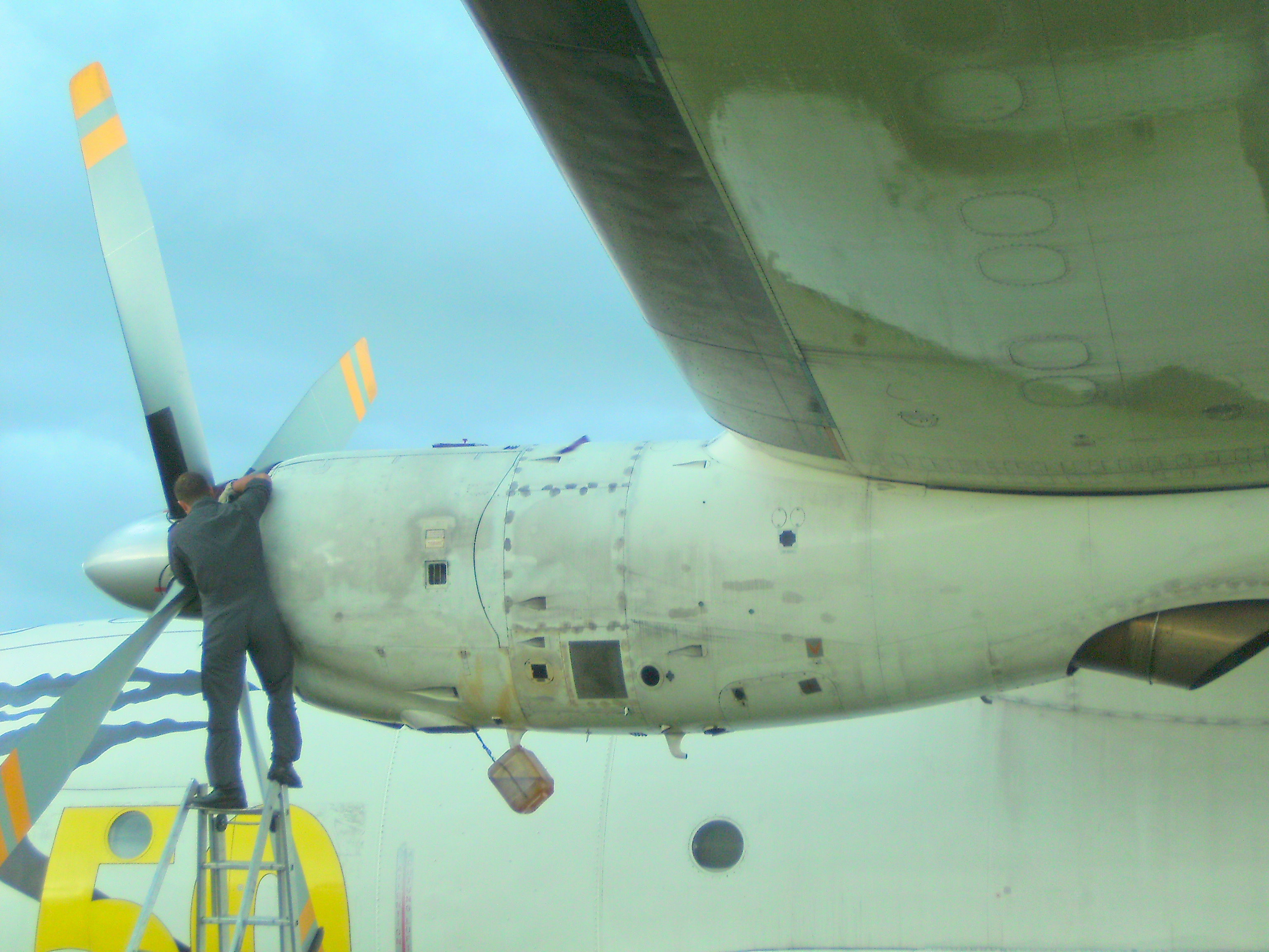 Tannkosh 2008